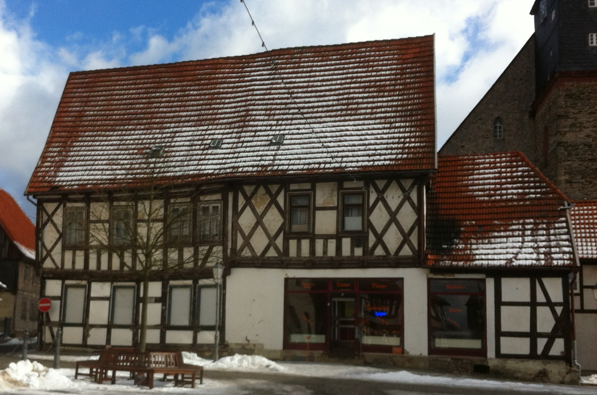 Haus Marktplatz 5 in Harzgerode